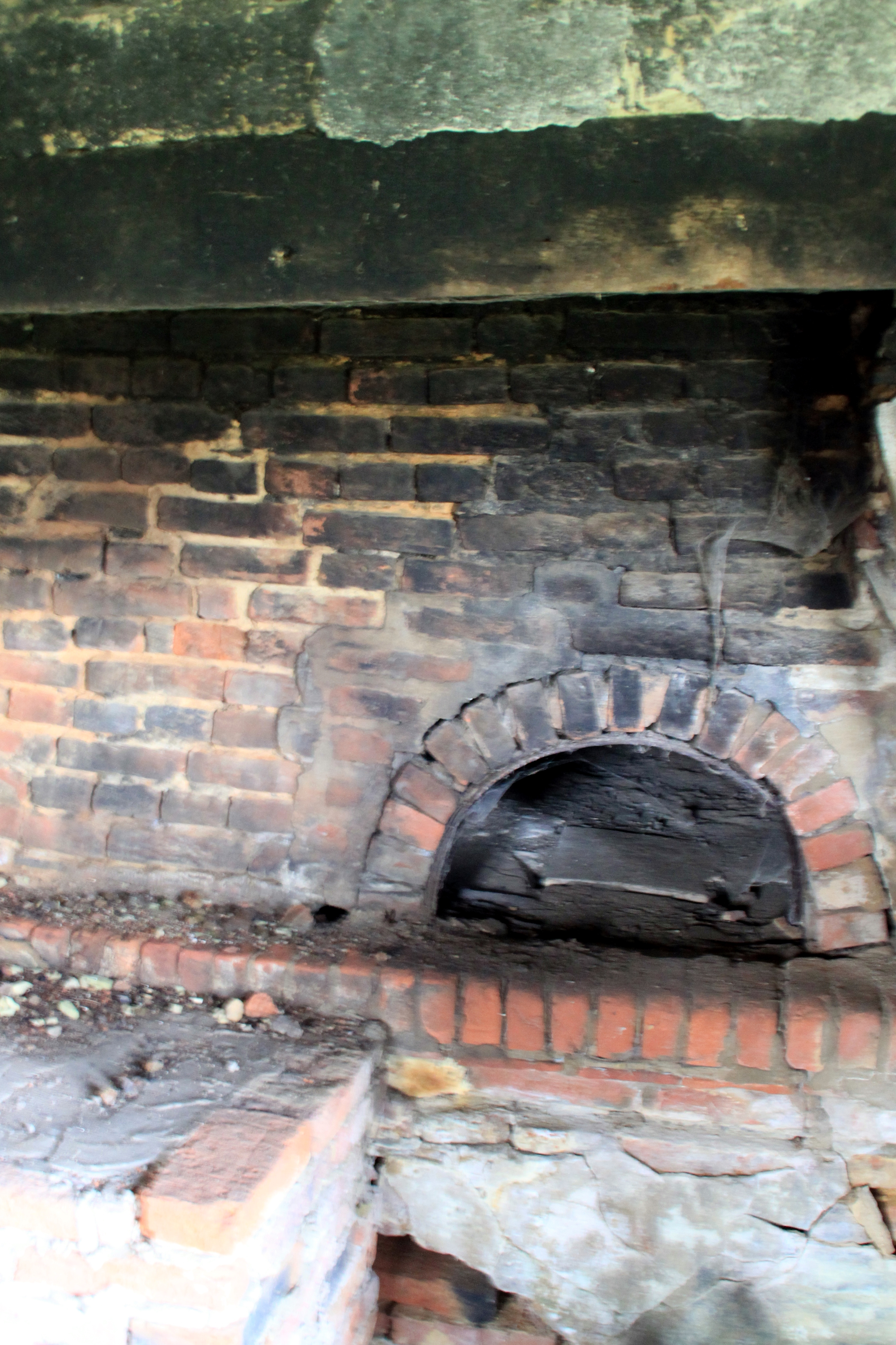 Ofenöffnung im Backhaus in der Bresse